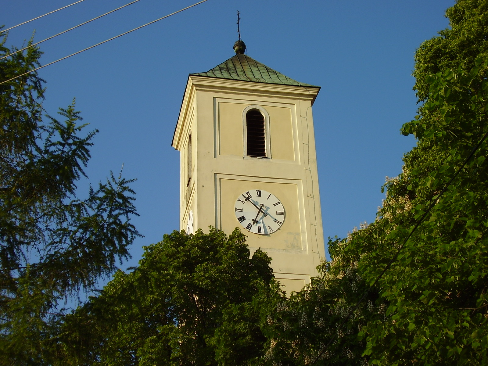 Rusovce - veža Kostola svätej Márie Magdalény